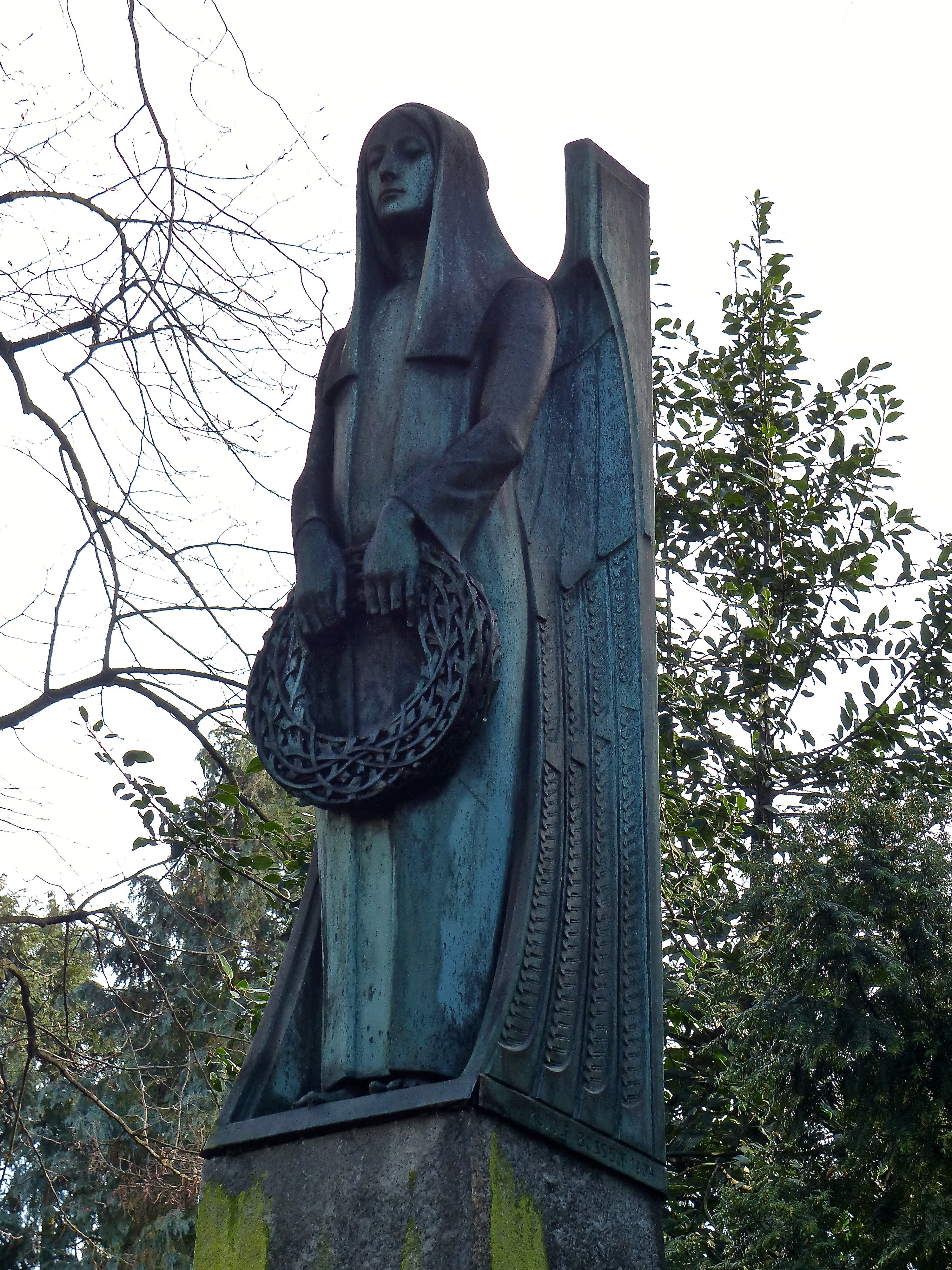 Grabmal Familie Franz Clouth auf dem Friedhof Melaten, Köln (Bildhauer Rudolf Bosselt), 1904